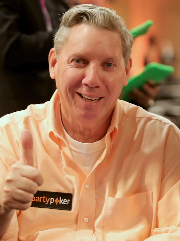 Mike Sexton beim WPT bestbet Bounty Scramble